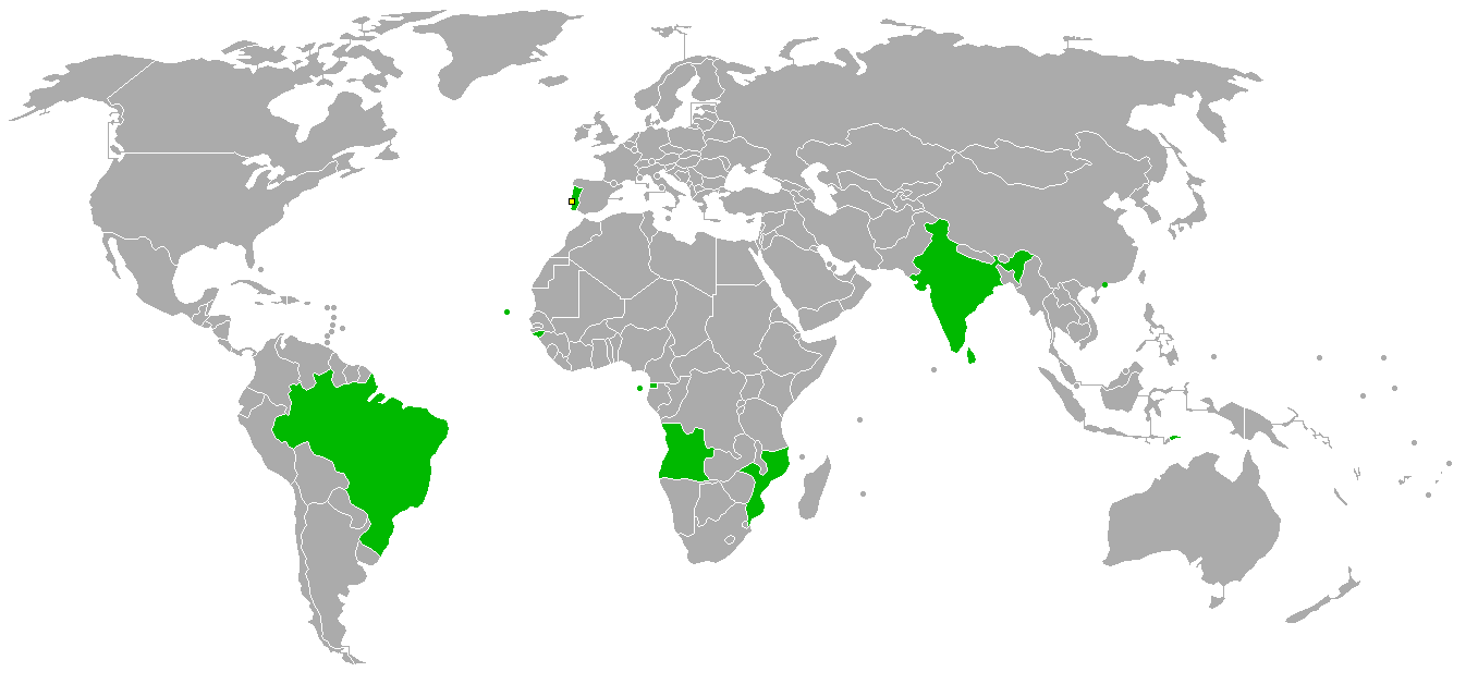 World map with participating countries at the 2006 Lusofonia Games